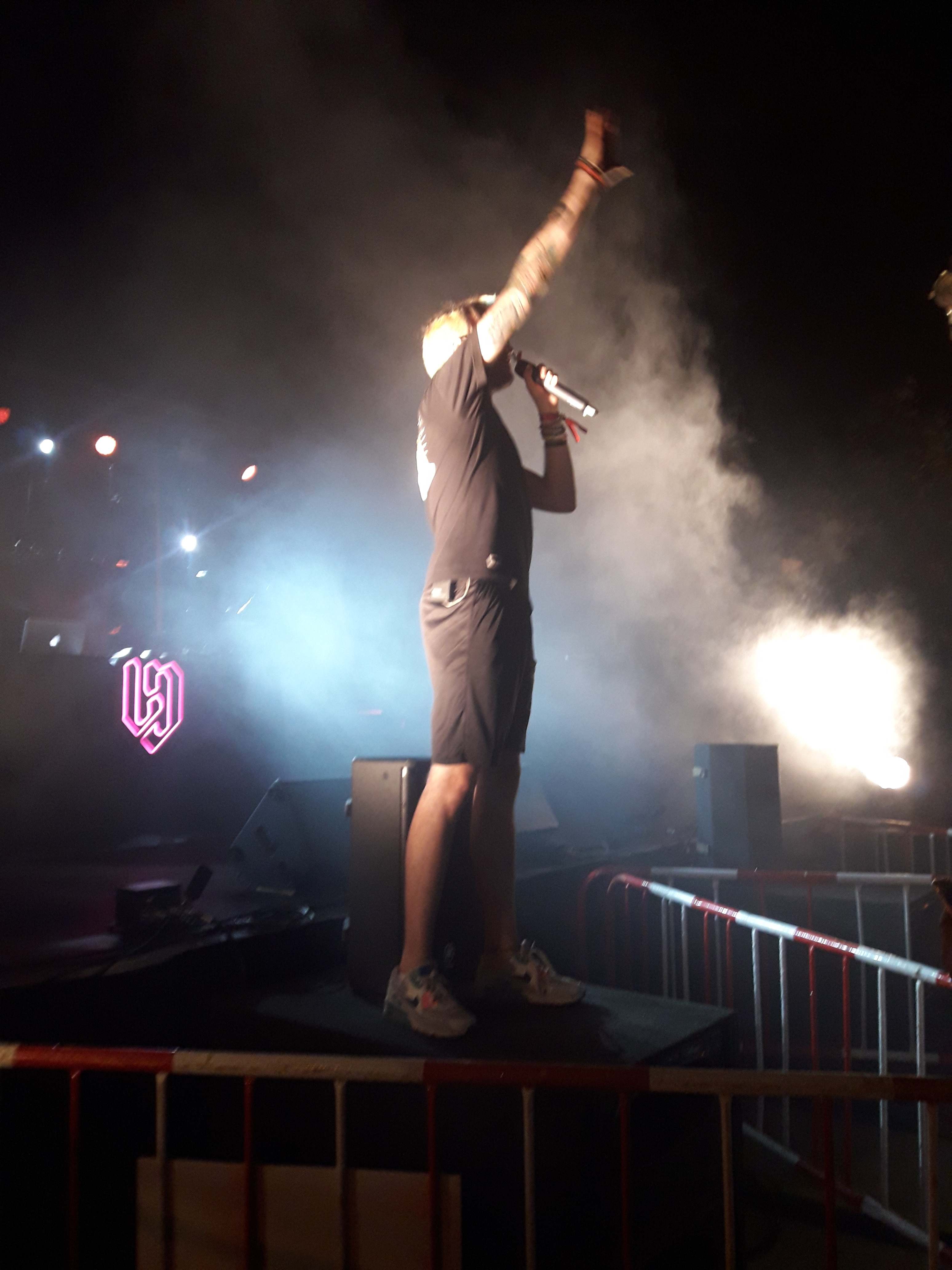 Lildami al concert de Fonteta